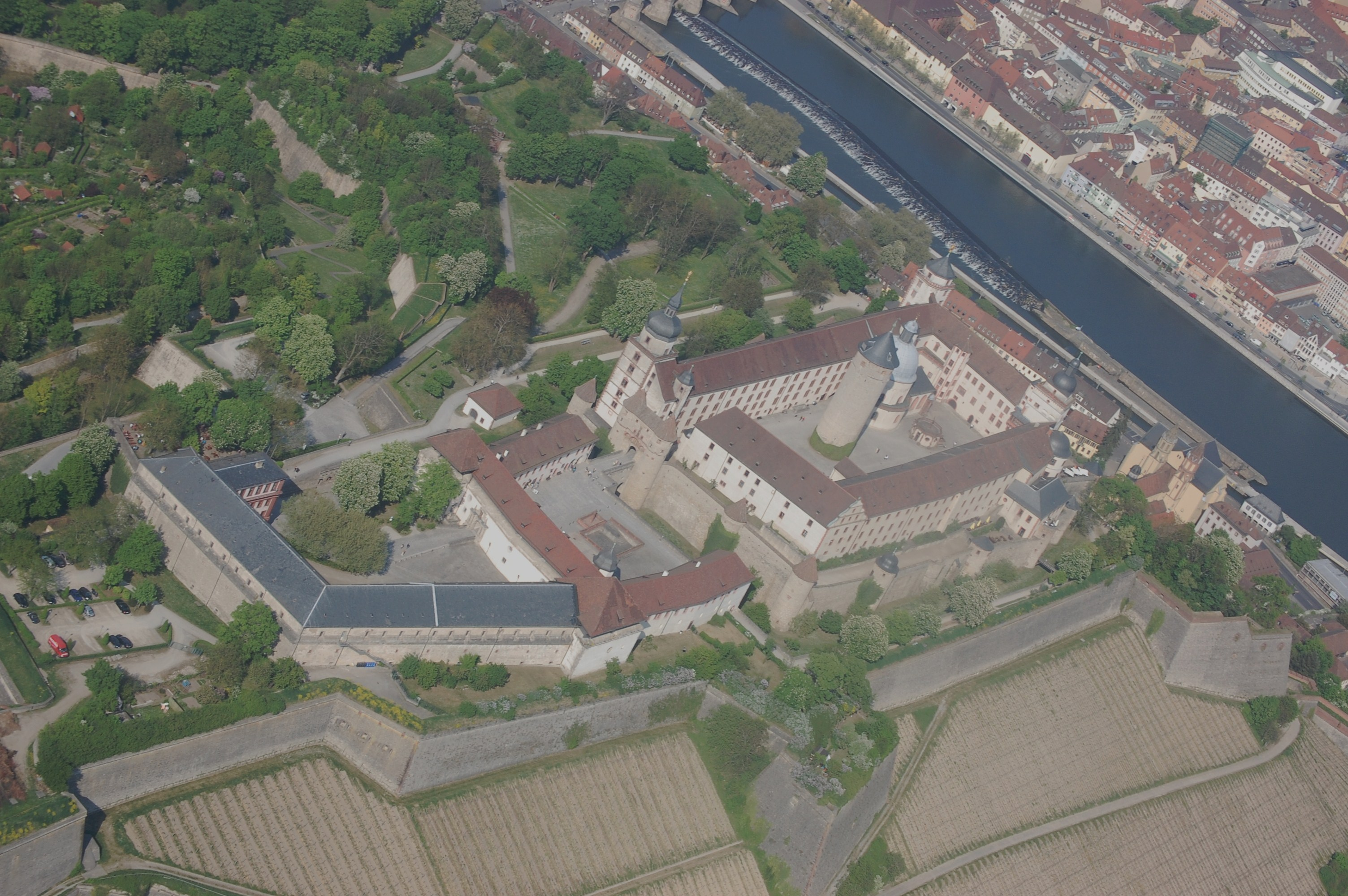 Festung Marienberg in Würzburg